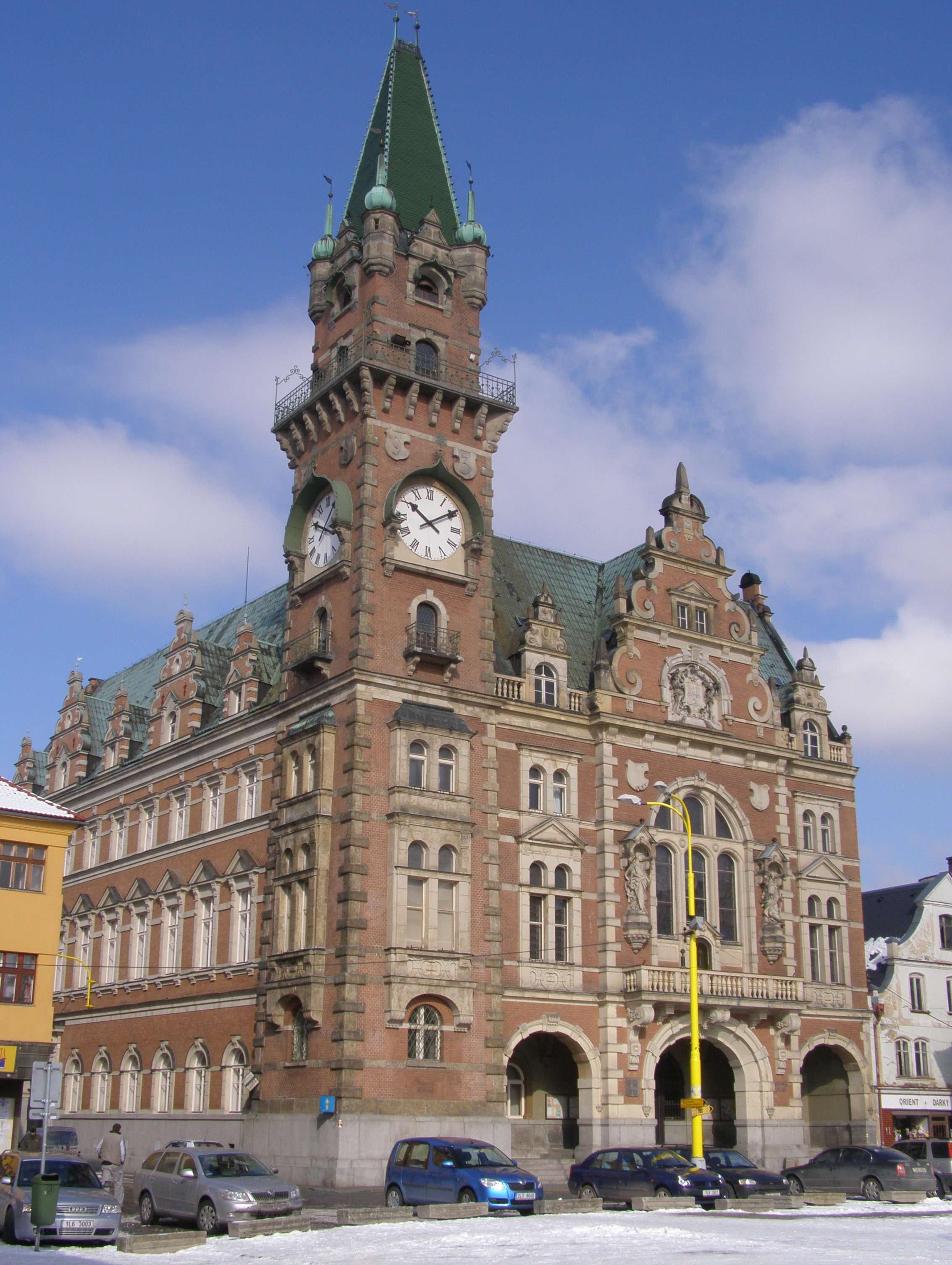 Frýdlant, Náměstí TGM, radnice